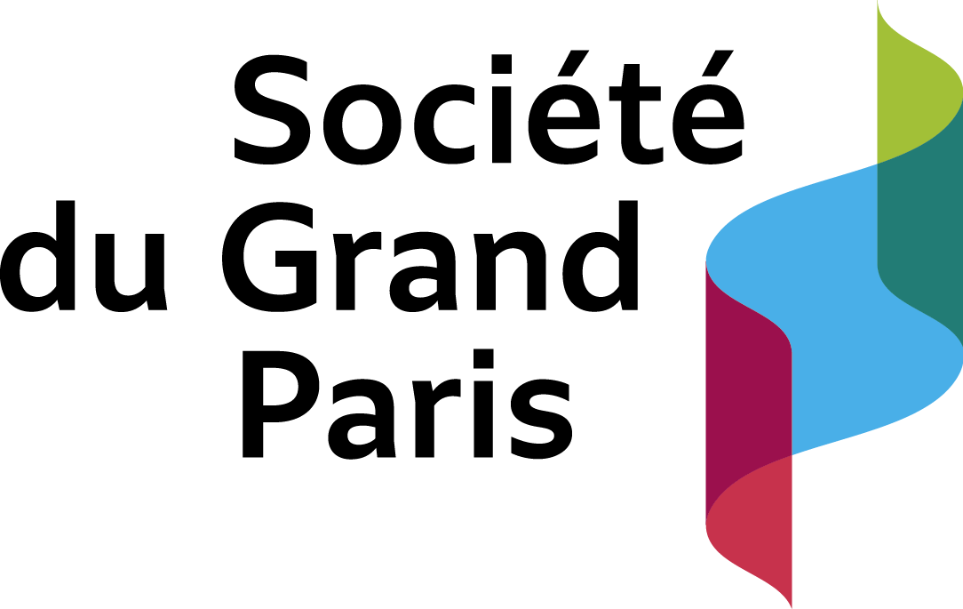 logo de la Société du Grand Paris au 13/04/2016